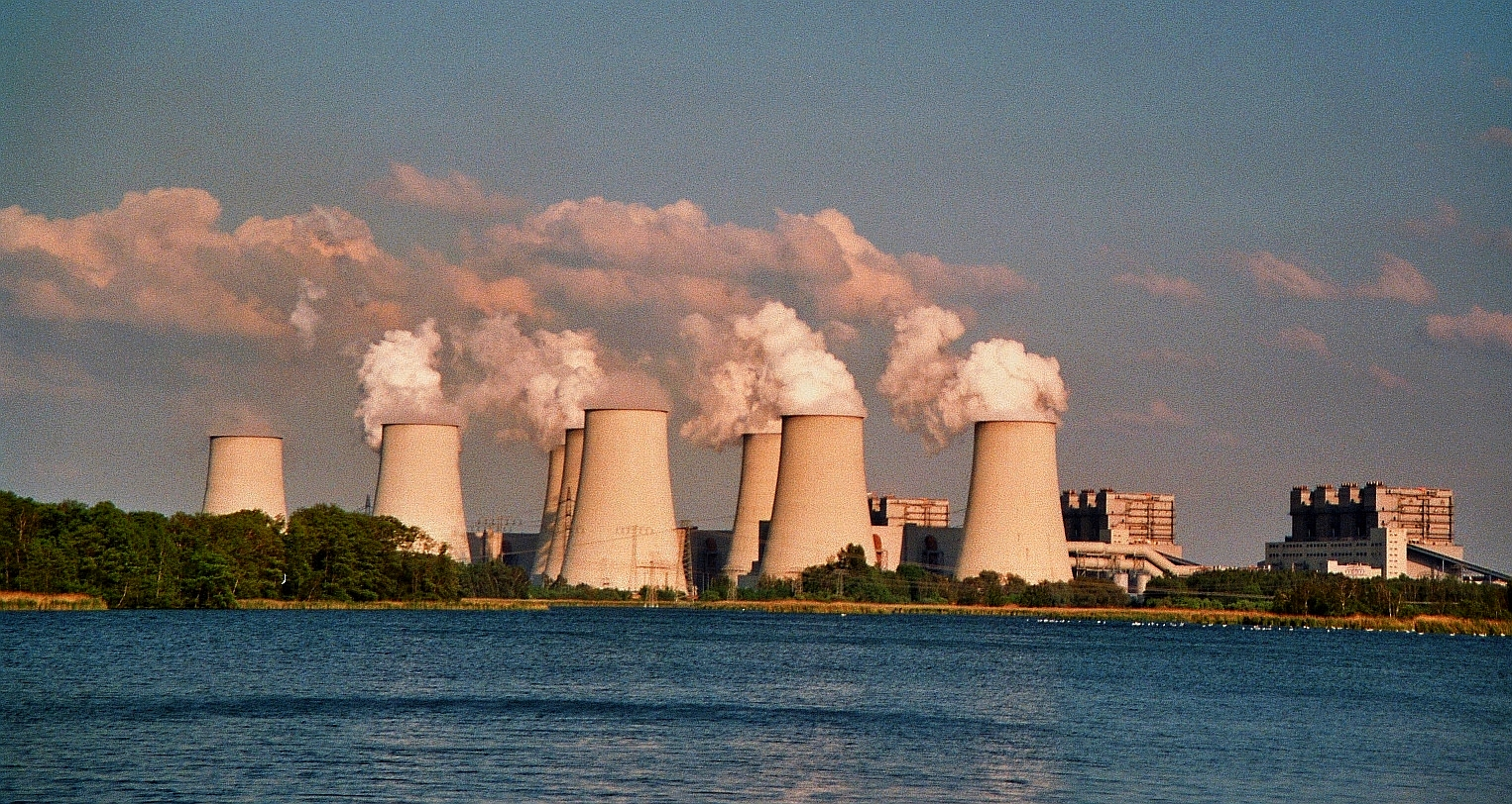 Das Kohlekraftwerk Jänschwalde in Brandenburg, Deutschland. Blick über die Peitzer Fischteiche im Frühling 2010.